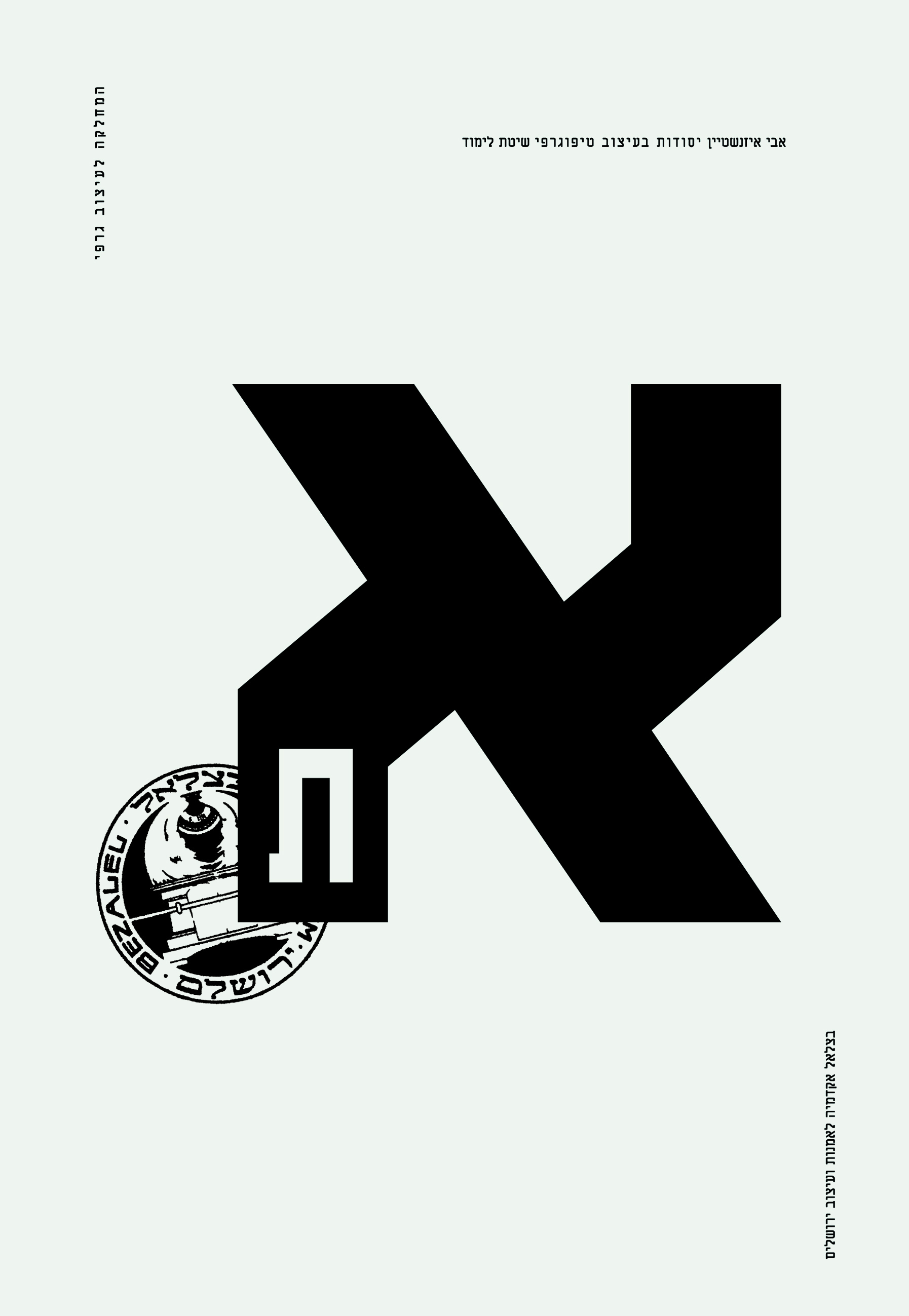 המחלקה לעיצוב גרפי אבי איזנשטיין יסודות בעיצוב טיפוגרפי שיטת לימוד הוצאת בצלאל 1986